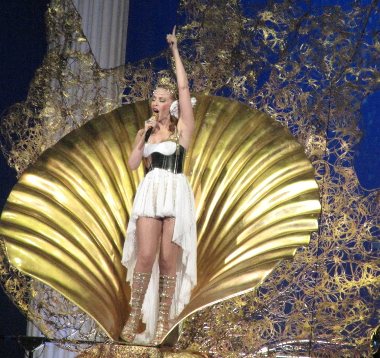 Kylie Minogue interpretando «Aphrodite» al inicio del concierto de Aphrodite Les Folies Tour